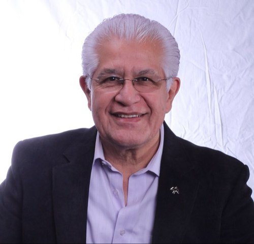 Willie Maldonado